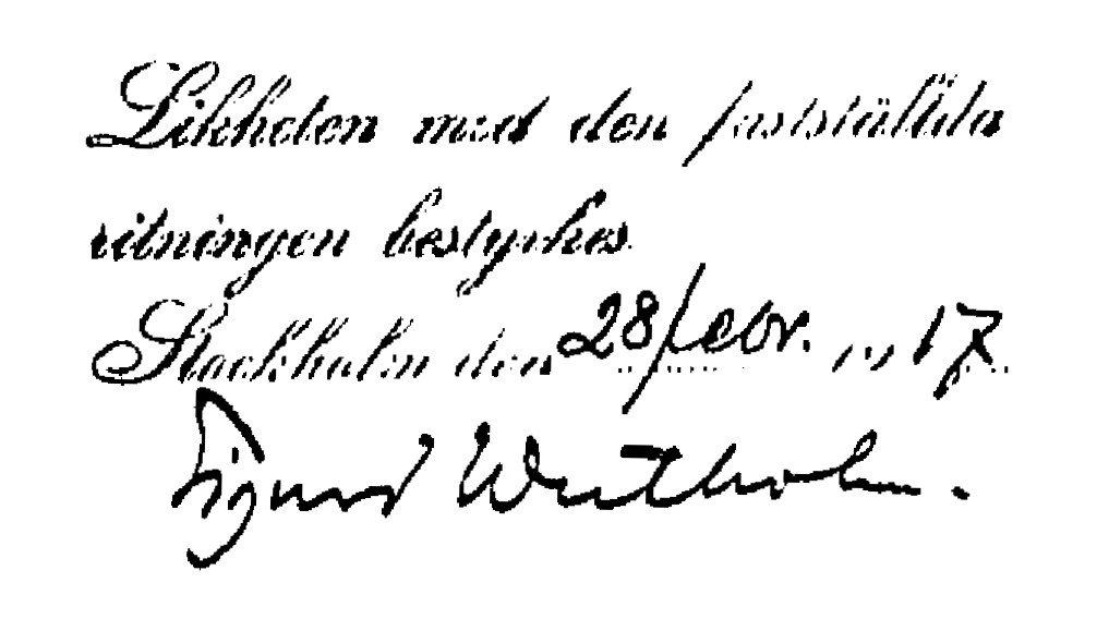 Stadsarkitekt Sigurd Westholms namnteckning på en bygglovritning från 1925